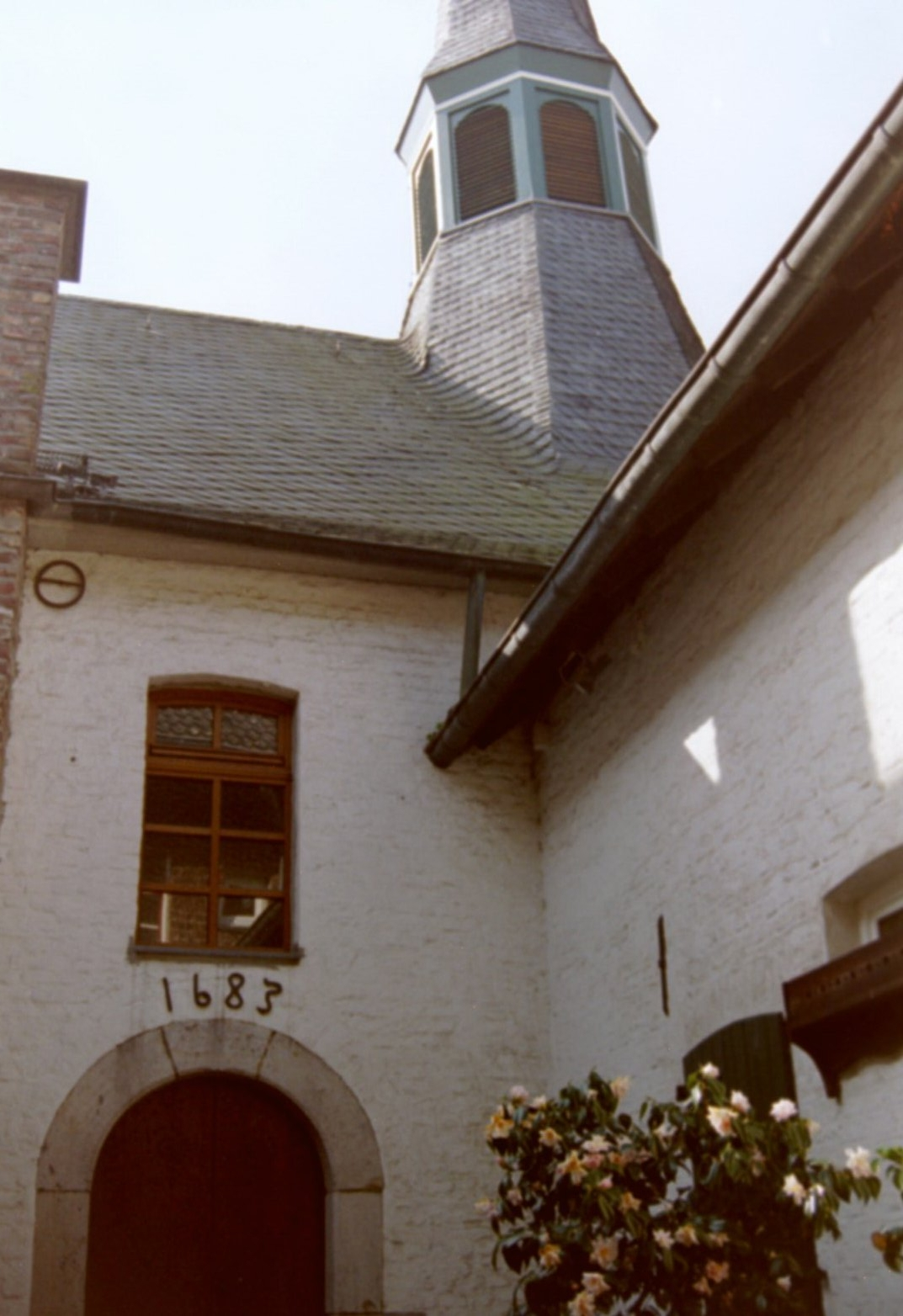 Eingang der Evangelische Hofkirche (Foto:Bodok2001)